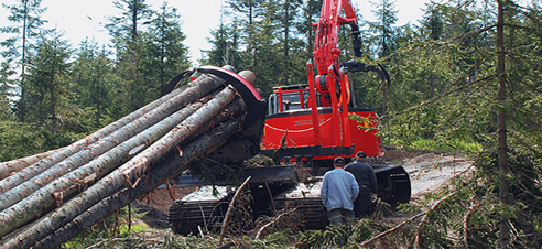 Elliator E235B SR XXLc – eine Kombination aus einem vollwertigem Hydraulikbagger und einem Rückezug. Neben Forstschleppern wird der Elliator überwiegend zu Holzrückearbeiten in der Wald- und Forstwirtschaft eingesetzt. Er wird als eine wendige Maschine bezeichnet, die bodenschonend zur Holzernte eingesetzt werden kann. Entwickelt von der Firma EMB Baumaschinen Handelsgesellschaft mbH